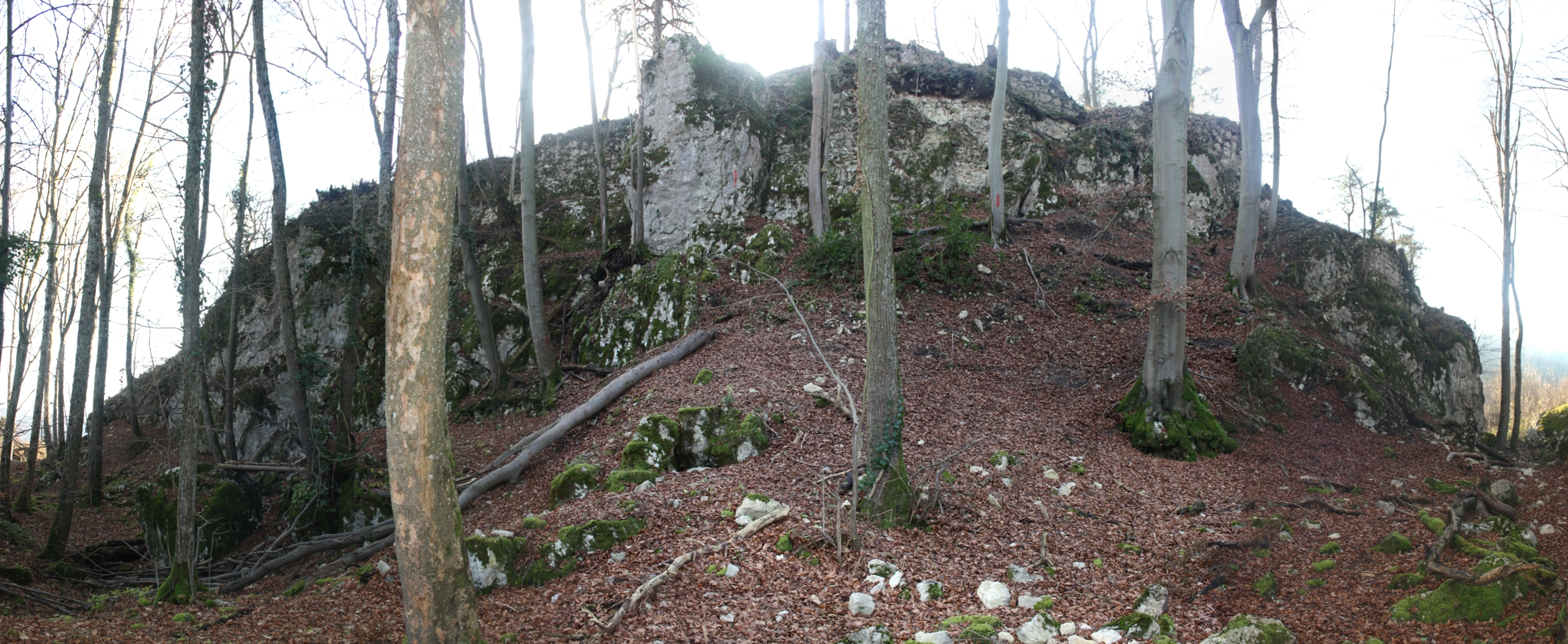 Ruine Frohberg, Aesch, Basel-Land, Schweiz